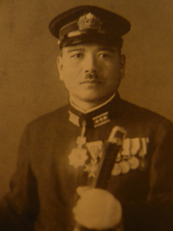 青木 大吉は、税理士、公認会計士。大日本帝国海軍の軍人。